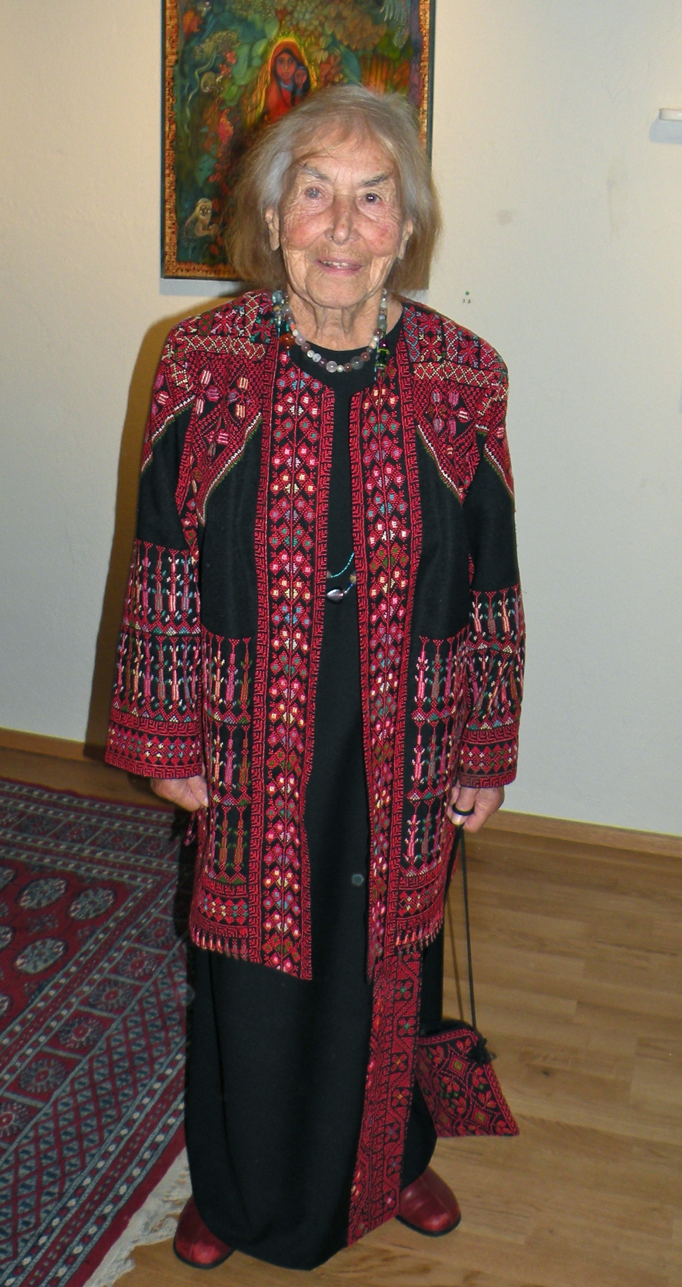 Tatjana Gamerith bei der Vernissage einer Ausstellung mit ihren Bildern am 19. Oktober 2013 in der Sturmmühle in Saxen, Bezirk Perg, Oberösterreich, Österreich